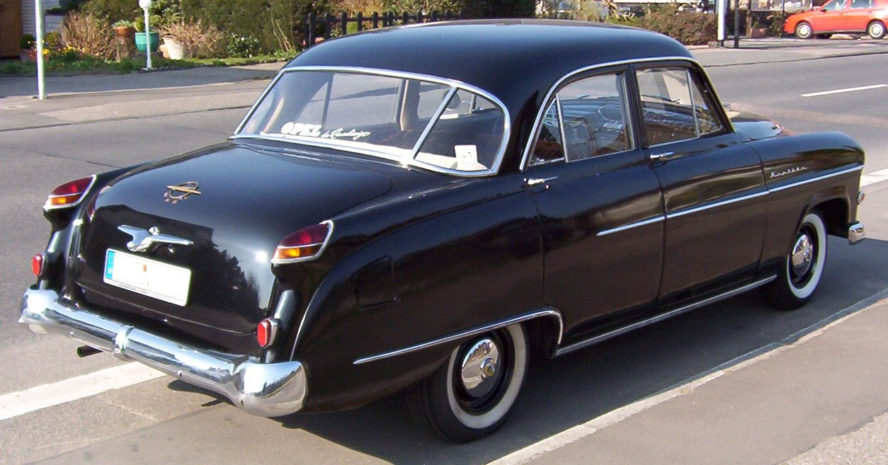 Opel Kapitän '54 (Heckansicht mit dreigeteilter Heckscheibe)